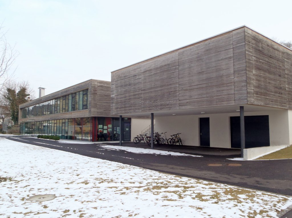 Zuchwil KIJUZU - Gemeindebibliothek, Kinder- und Jugendzentrum. 2012-02-14